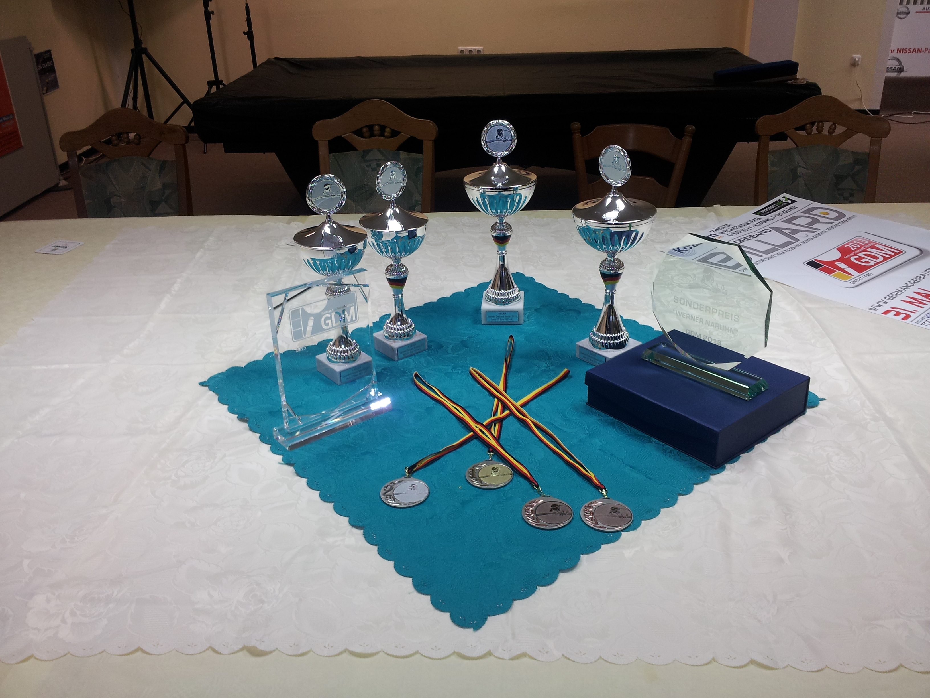 Pokale und Medaillen